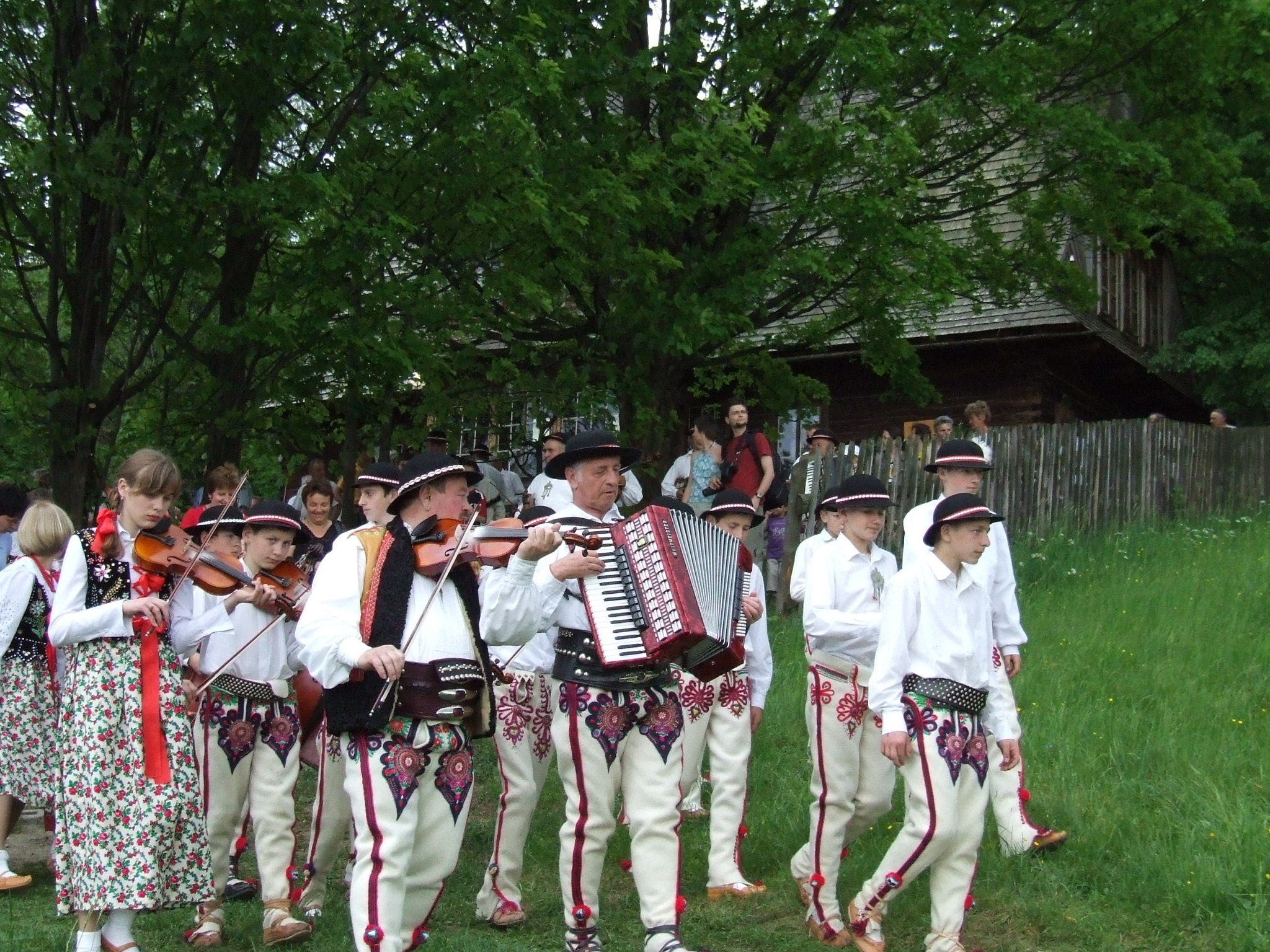 orkan's festival in Poręba Wielka (26 may 2007); majówka orkanowska w Porębie wielkiej (26 maj 2007)